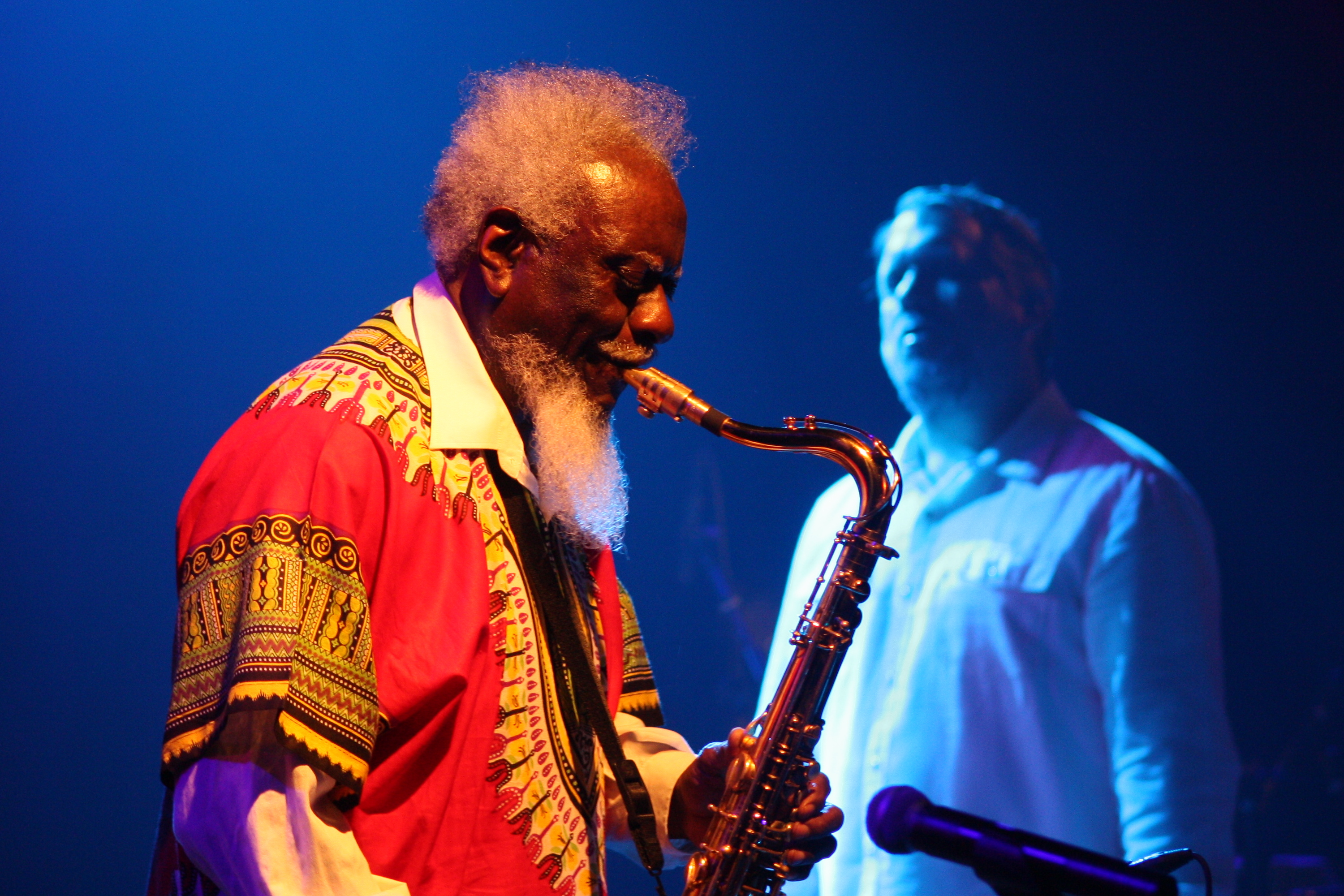 44. Deutsches Jazzfestival Frankfurt 2013: Pharoah Sanders